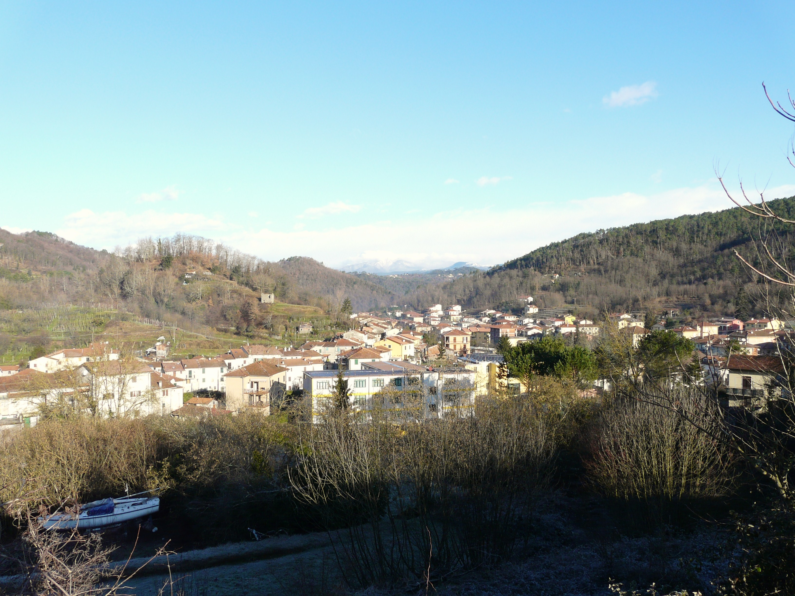 Riccò del Golfo di Spezia, Liguria, Italia